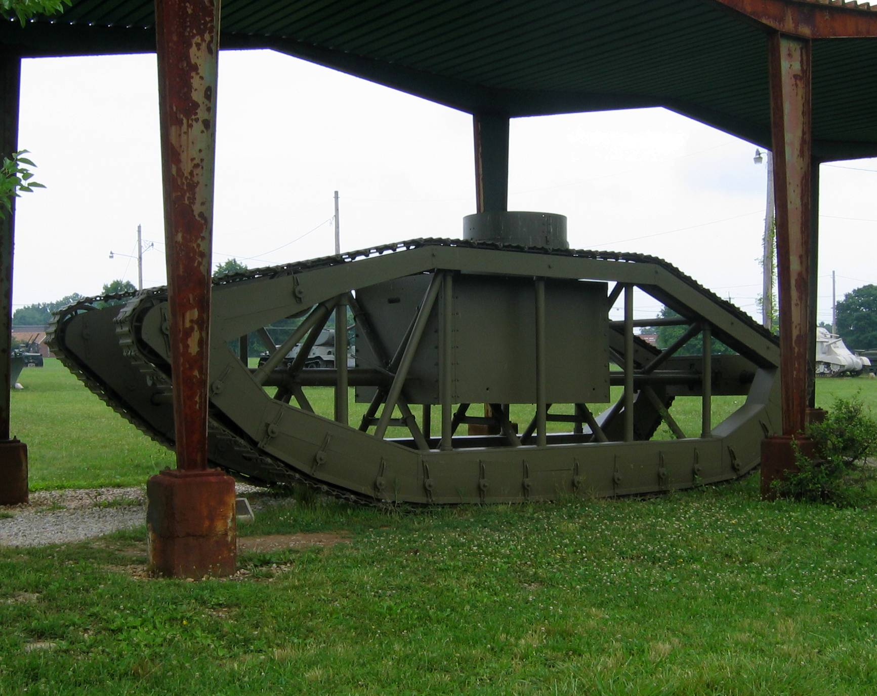 Skeleton Tank preserved at Aberdeen Proving Ground